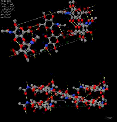 Darstellung mit JMol aufgrund eigener Berechnungen nach den Daten in Ram Minke, John Blackwell: The structure of α-chitin. In: Journal of Molecular Biology. Band 120, Nr. 2, 1978, S. 167–181.Darstellung ohne Wasserstoffatome. Für das sechte Sauerstoffatom gibt es zwei Gitterplätze (semitransparent dargestellt), die statistisch belegt werden.